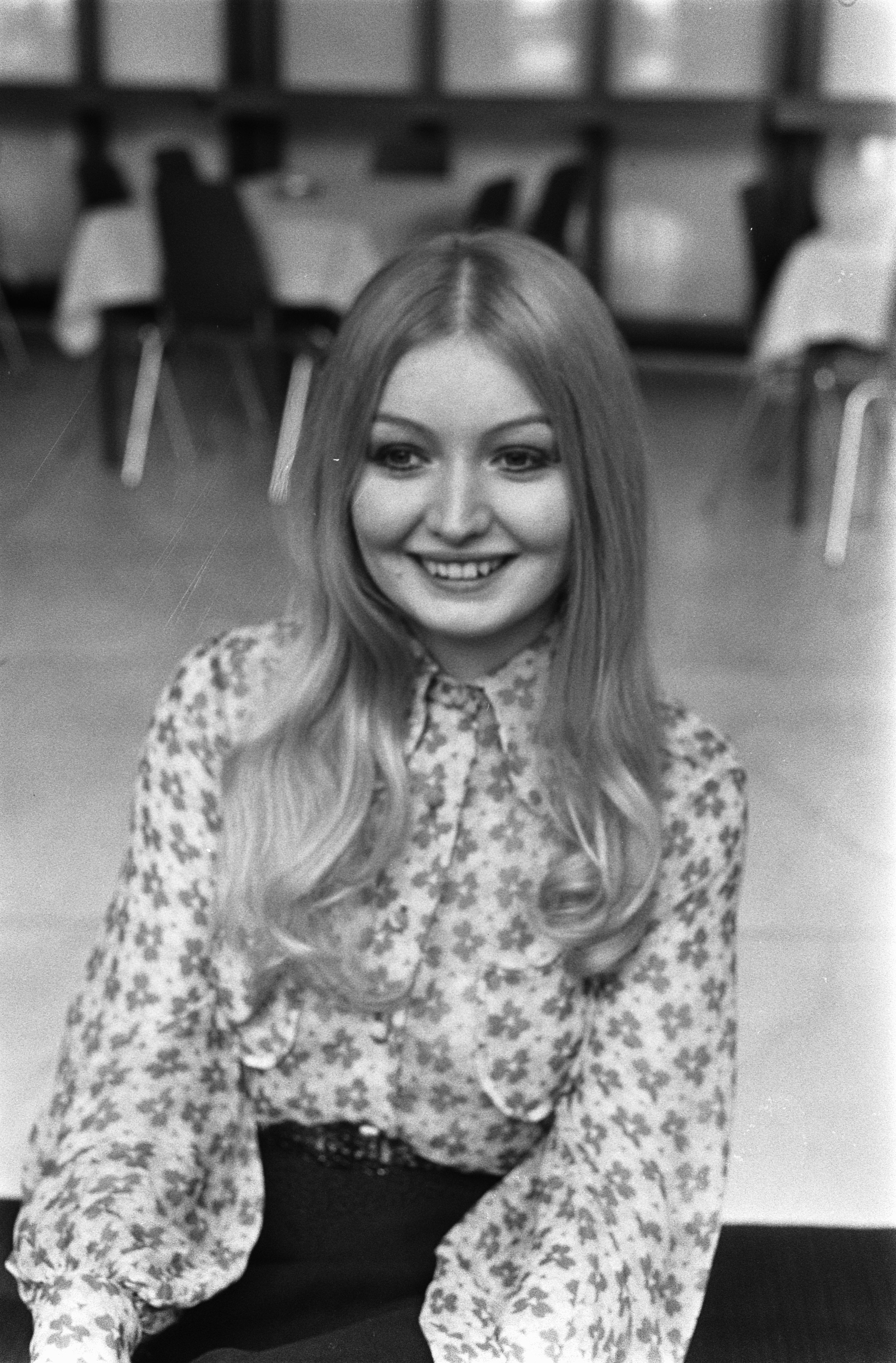 Collectie / Archief : Fotocollectie Anefo Reportage / Serie : Eurovisie Songfestival 1970 in RAI te Amsterdam Beschrijving : Aankomst artiesten op Schiphol. Mary Hopkin (Engeland) Datum : 19 maart 1970 Locatie : Schiphol Trefwoorden : artiesten, songfestivals, zangers Persoonsnaam : Hopkin, Mary Instellingsnaam : Eurovisie Song Festival Fotograaf : Koch, Eric / Anefo Auteursrechthebbende : Nationaal Archief Materiaalsoort : Negatief (zwart/wit) Nummer archiefinventaris : bekijk toegang 2.24.01.05 Bestanddeelnummer : 923-3651 Reacties Geplaatst door Musiclady op 28 juli 2016 - 09:53. Persoonsnaam: Hopkin, Mary